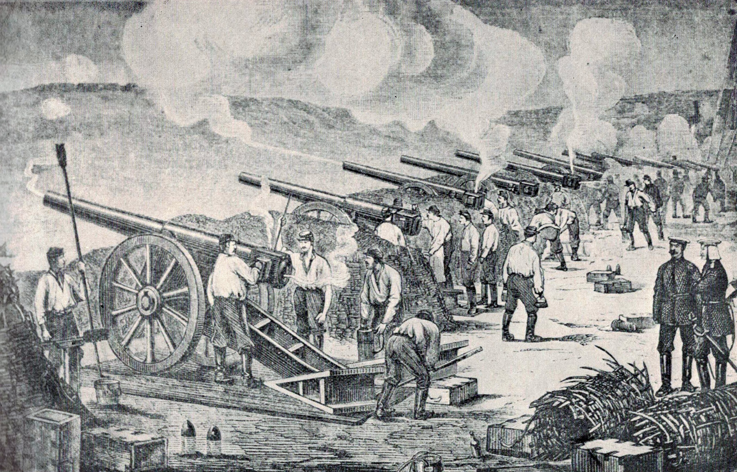 Четиридневна артилерийска подготовка преди Третата атака на Плевен.